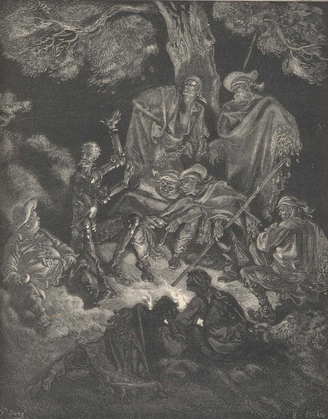 "Discurso de Dom Quixote aos Cabreiros" (1863), iIustração por Gustave Doré para “Don Quixote“ de Miguel de Cervantes.